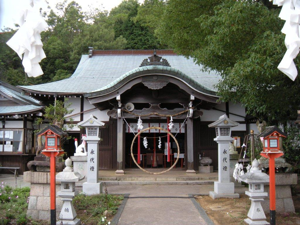 神戸市長田区高取山町に鎮座している高取神社本殿